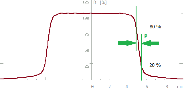 Strahlentherapie - Querprofil mit Einzeichnung zur Bewertung des Halbschattens